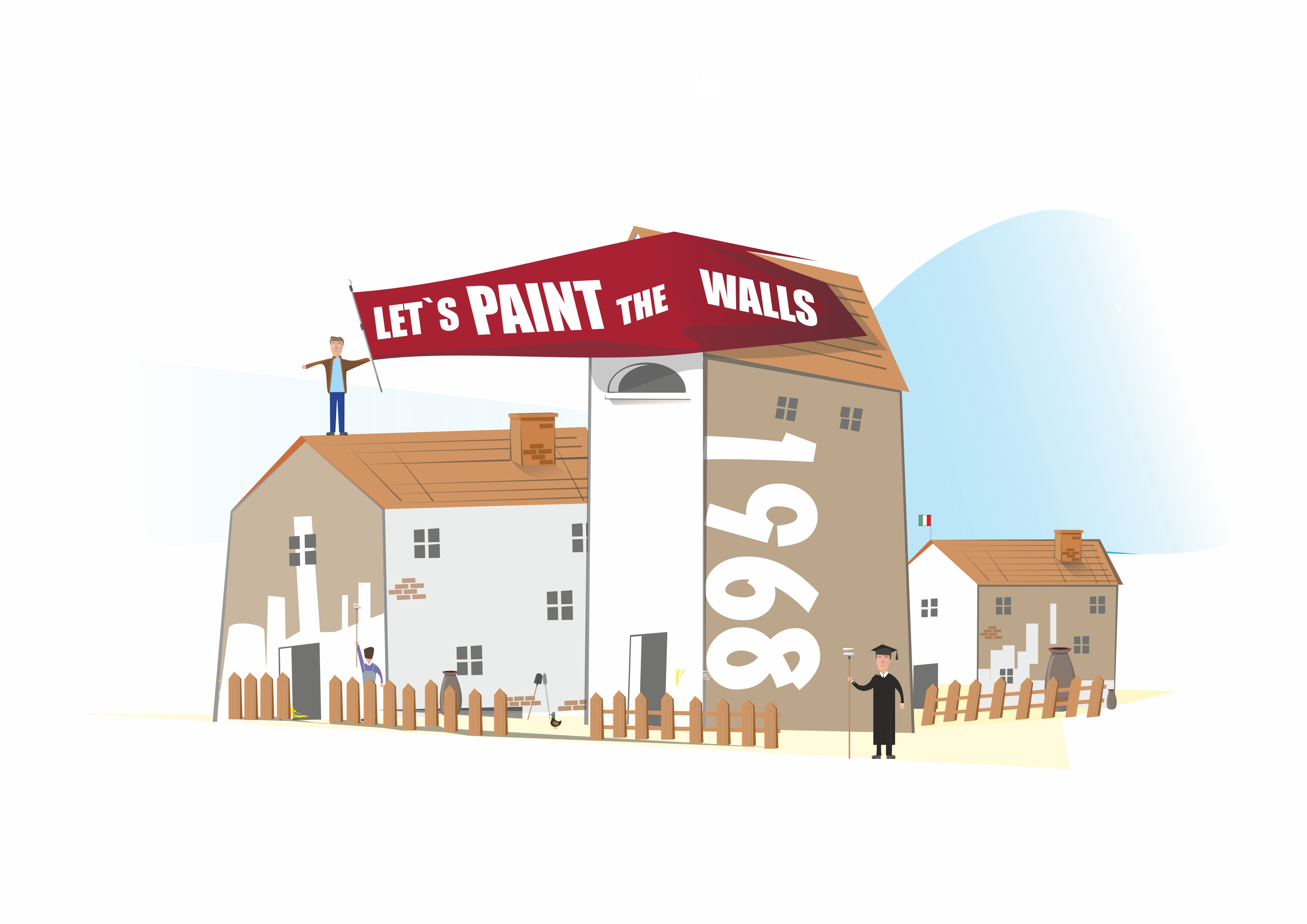 Сан-Сперато до 1968 год (иллюстрация)